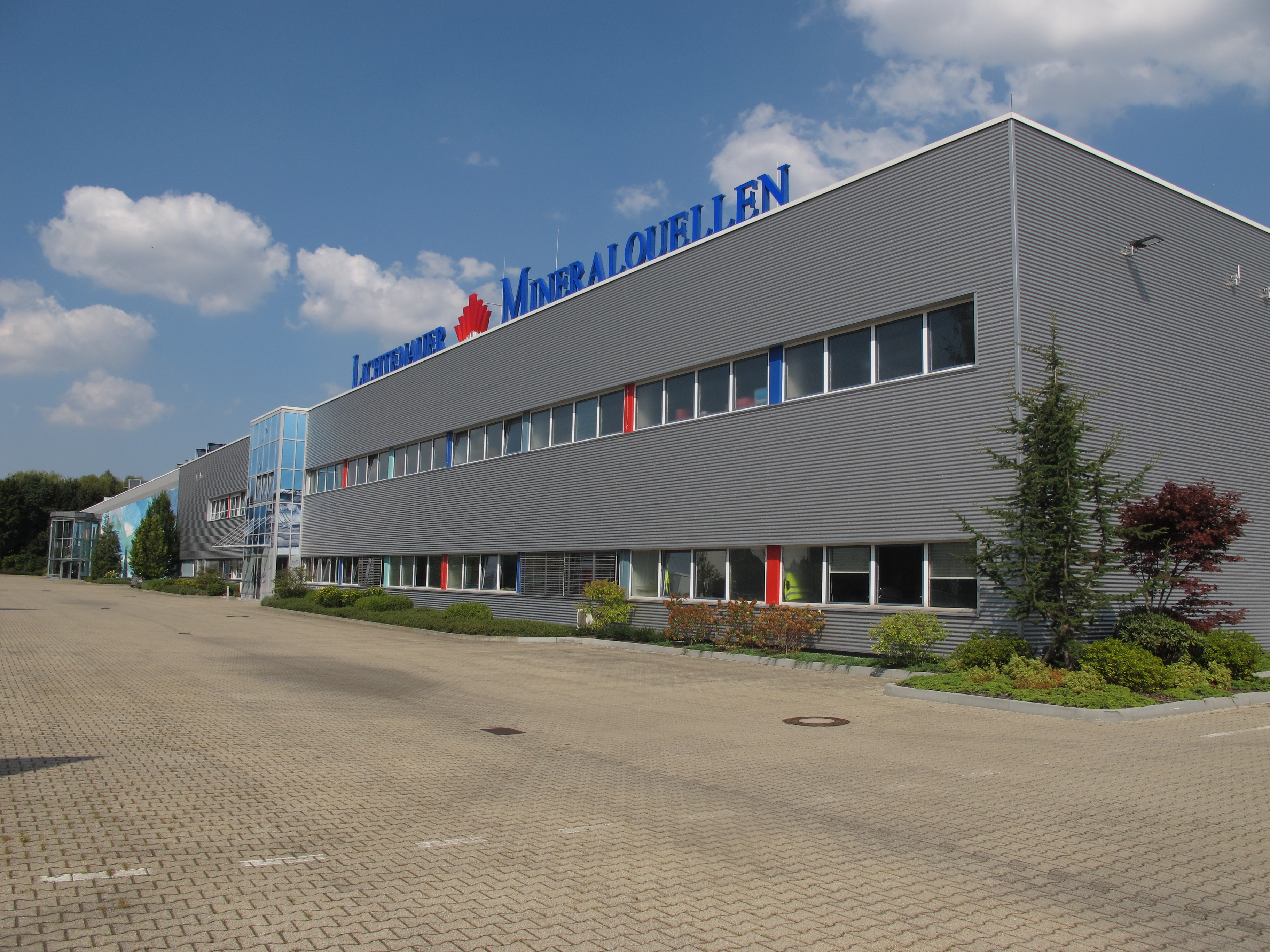 Die Lichtenauer Mineralquellen GmbH im sächsischen Lichtenau.